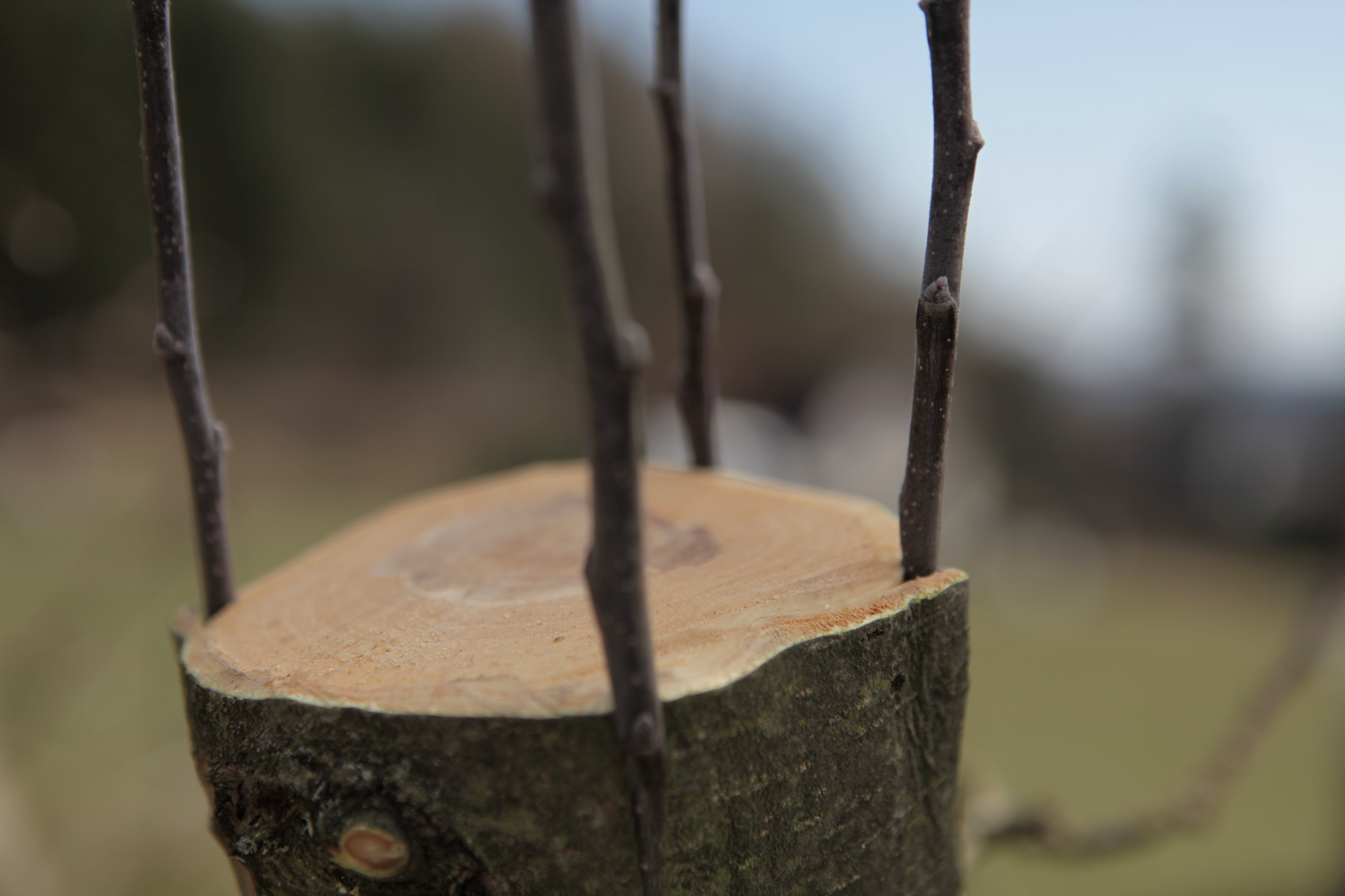 Roubování jabloně Melrose na podnož Prima, metoda roubování na kozí nožku, roubování za kůru, foto: Vít Švajcr